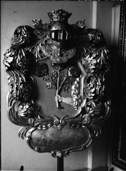 Huvudbanér, över Rosenqvist i Åkershult, död 1676. Efter restaurering 1933. Kategori: (09) VapenHuvudbanér, över Rosenqvist i Åkershult, död 1676. Efter restaurering 1933.